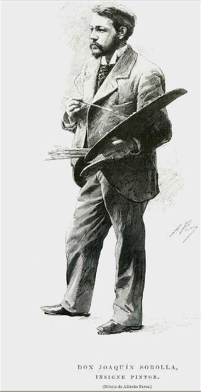 Ritratto in piedi di Joaquin Sorolla - disegno